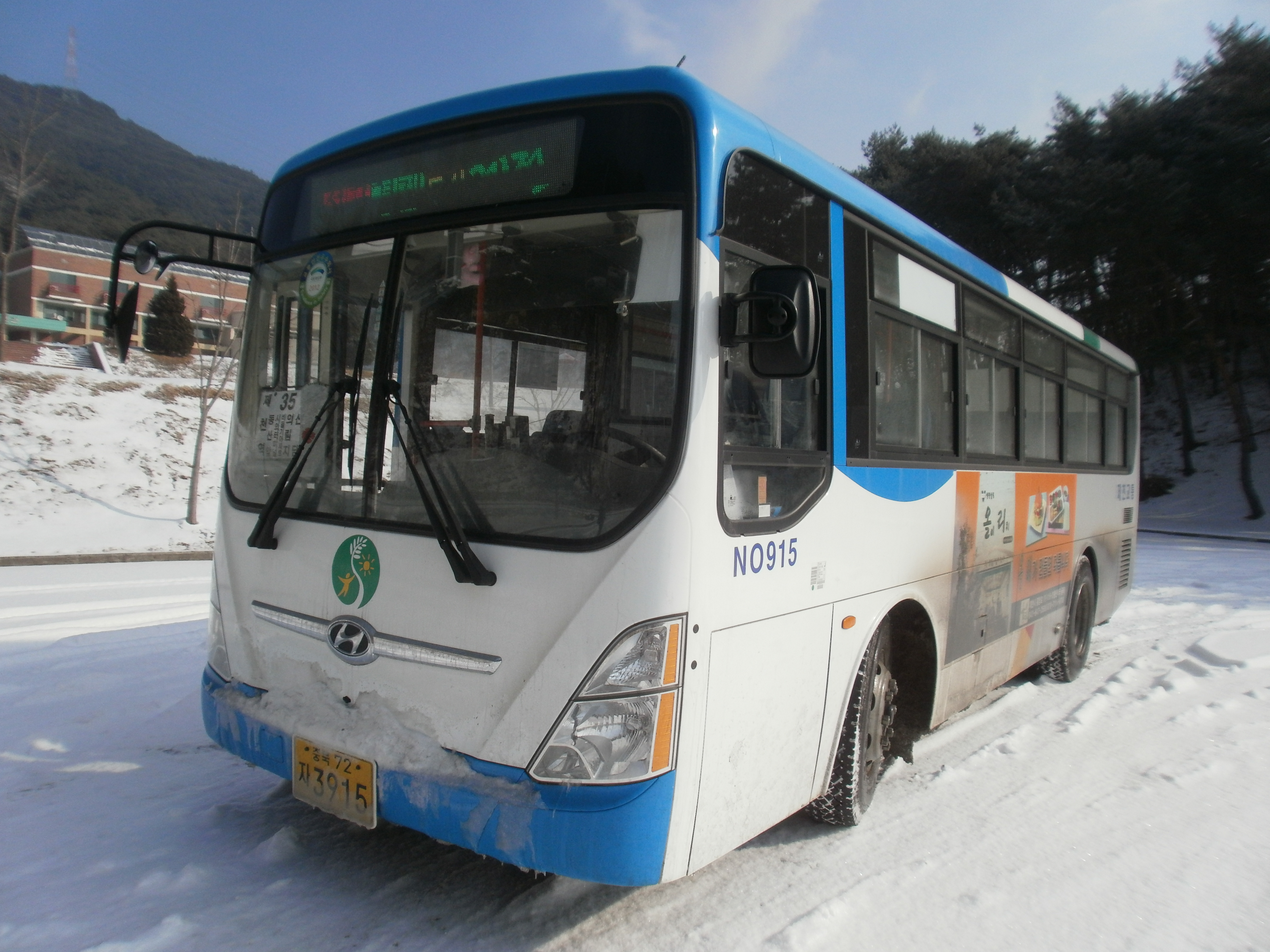 제천시 청소년 수련원에 대기 중인 버스